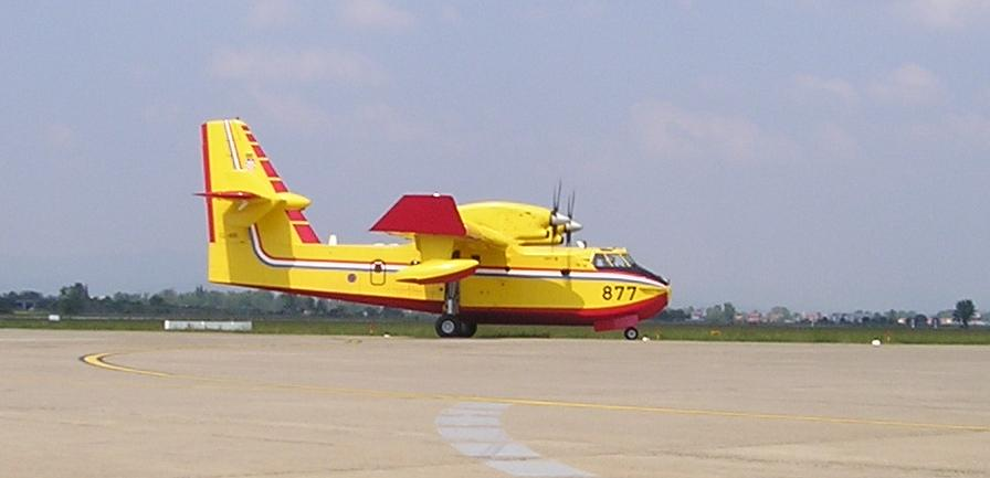 Canadair CL-415 at Zagreb airport